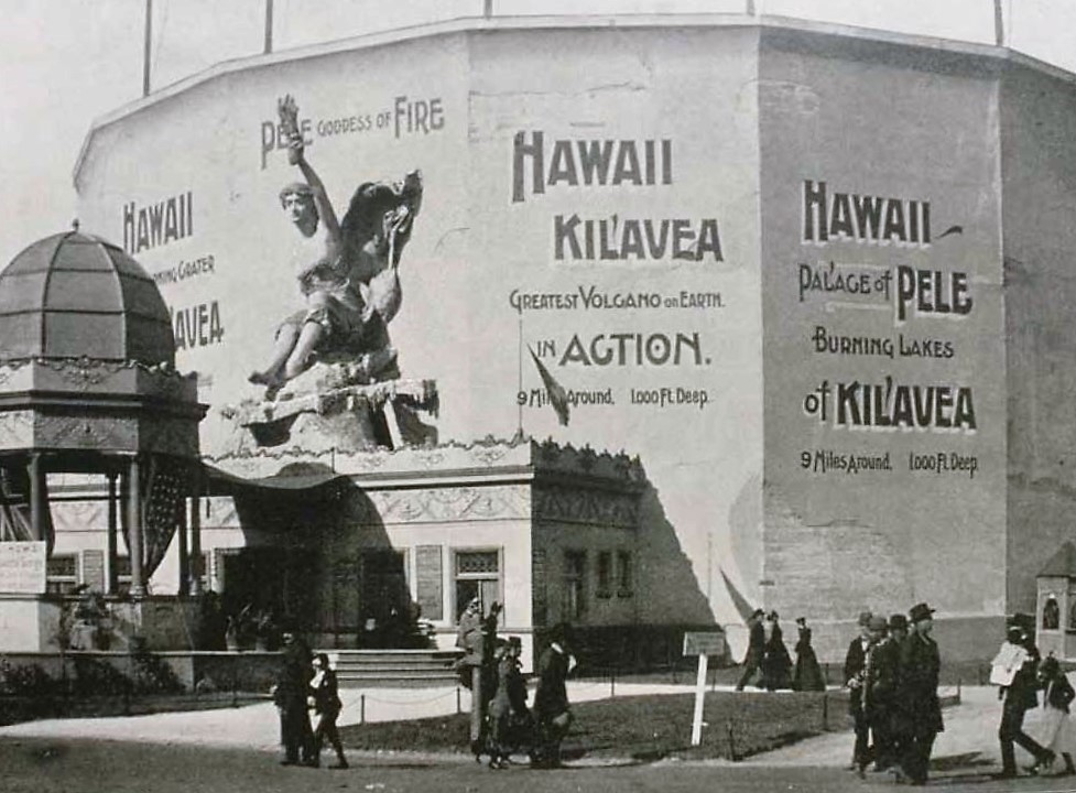 Statue der hawaiianischen Feuergöttin Pele, von Ellen Rankin Copp geschaffen für den Eingangsbereich des "Hawaiian Building" der Weltausstellung in Chicago 1893